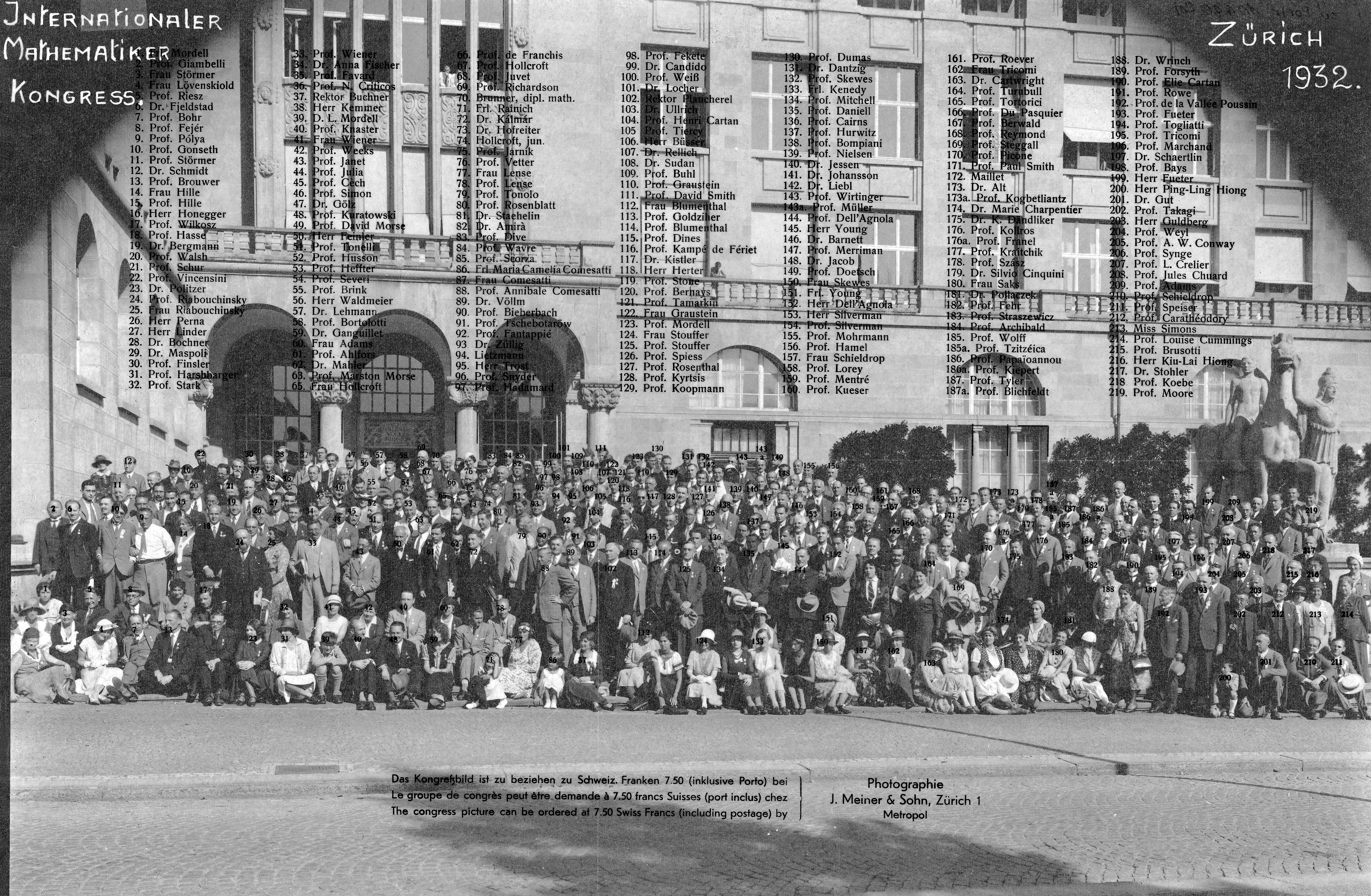 Internationaler Mathematikerkongress, Zürich 1932 – Gruppenbild. Montage mit den Namen und Positionen der Teilnehmer.